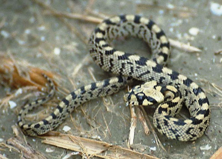 Couleuvre à échelons (immature) / Ladder Snake (Elaphe scalaris) Camargue - Bouches-du-Rhône (13) - FRANCE